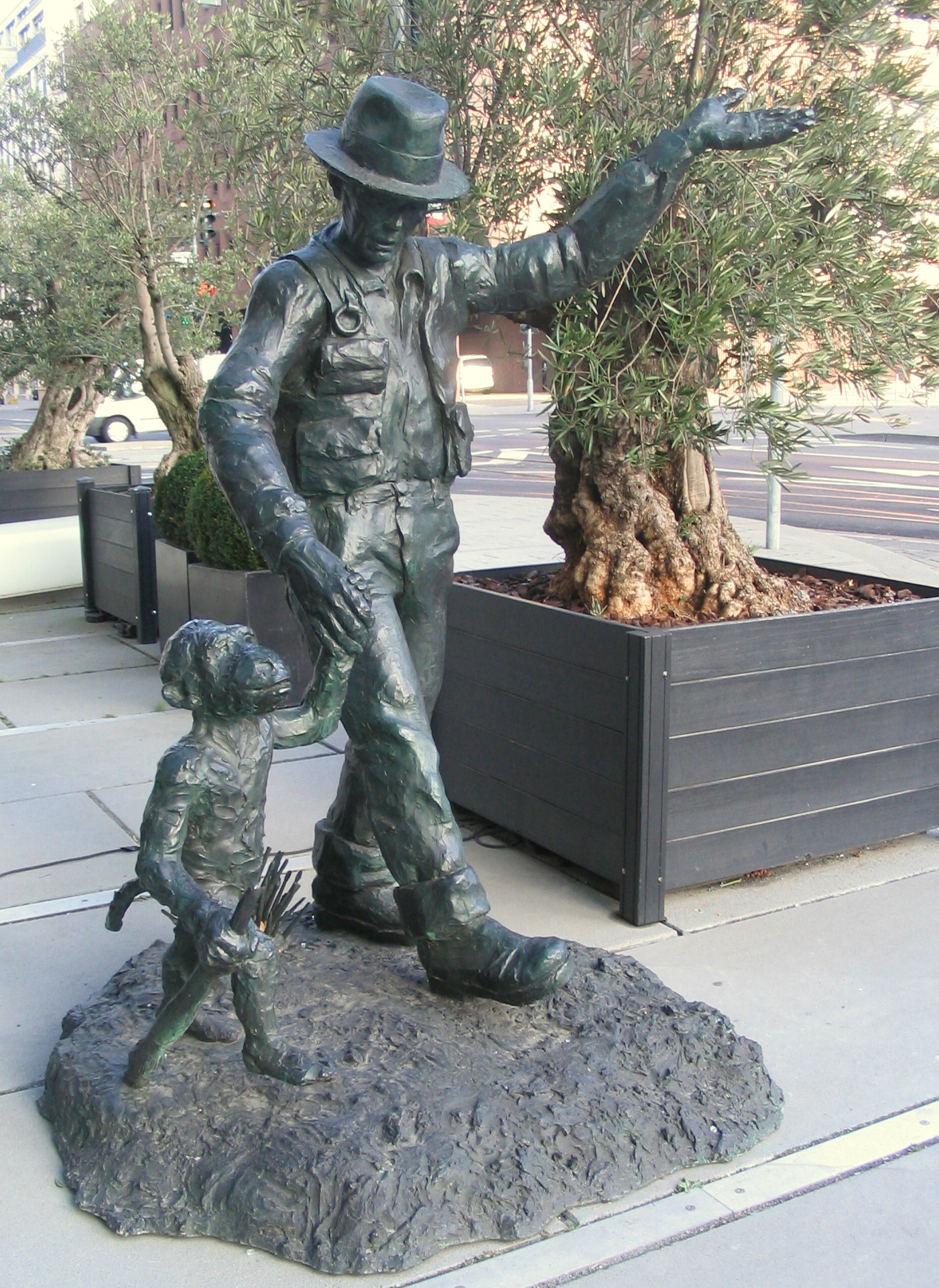 Skulptur Joseph Beuys mit Affe, von Jörg Immendorff, GAP 15, vor den Restaurants Monkey's South und Monkey's West.